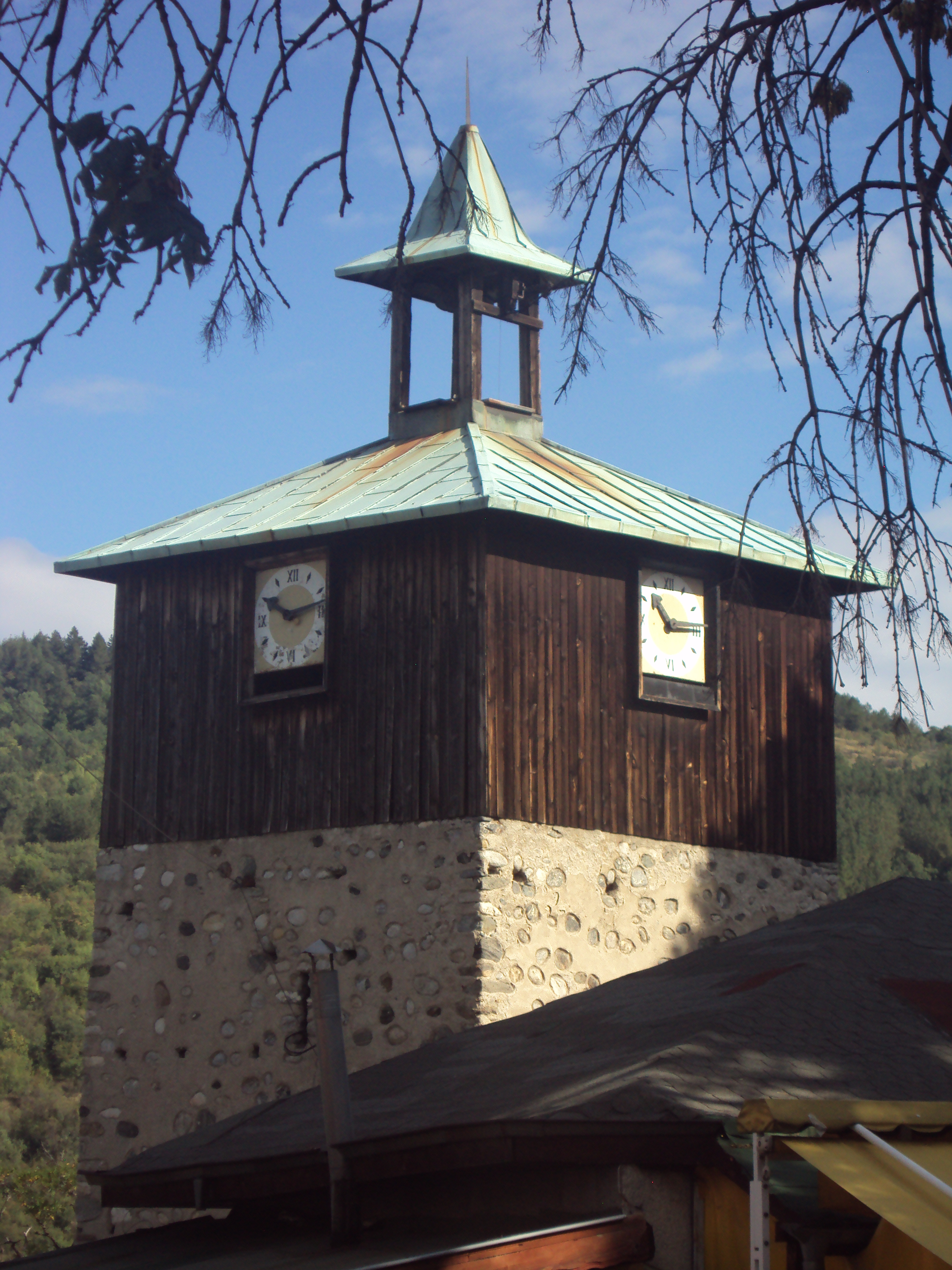 Часовниковата кула в Дупница